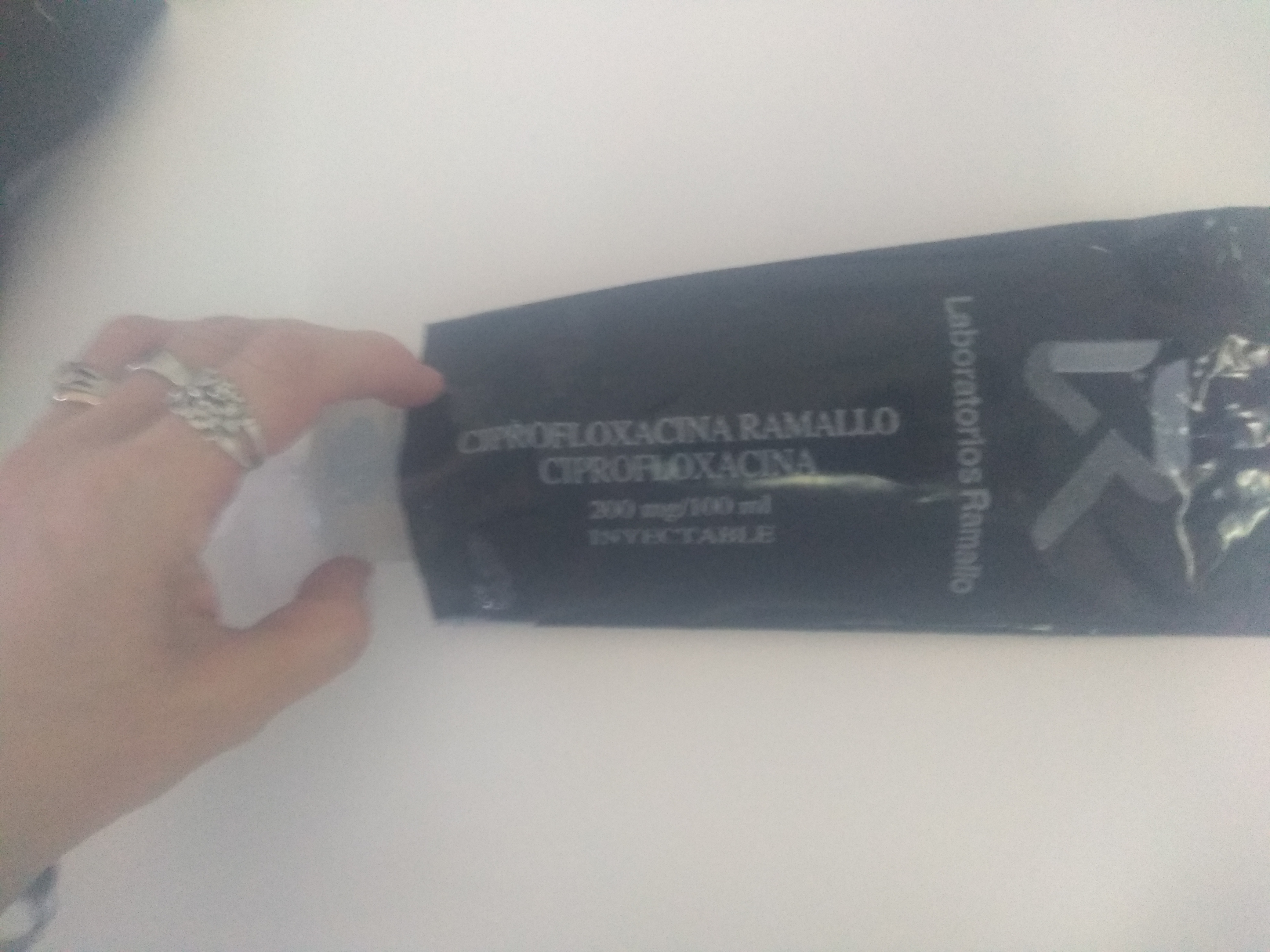 La luz puede afectar la composición química del producto